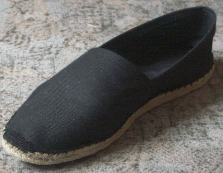 Espadrilles (straw shoe)